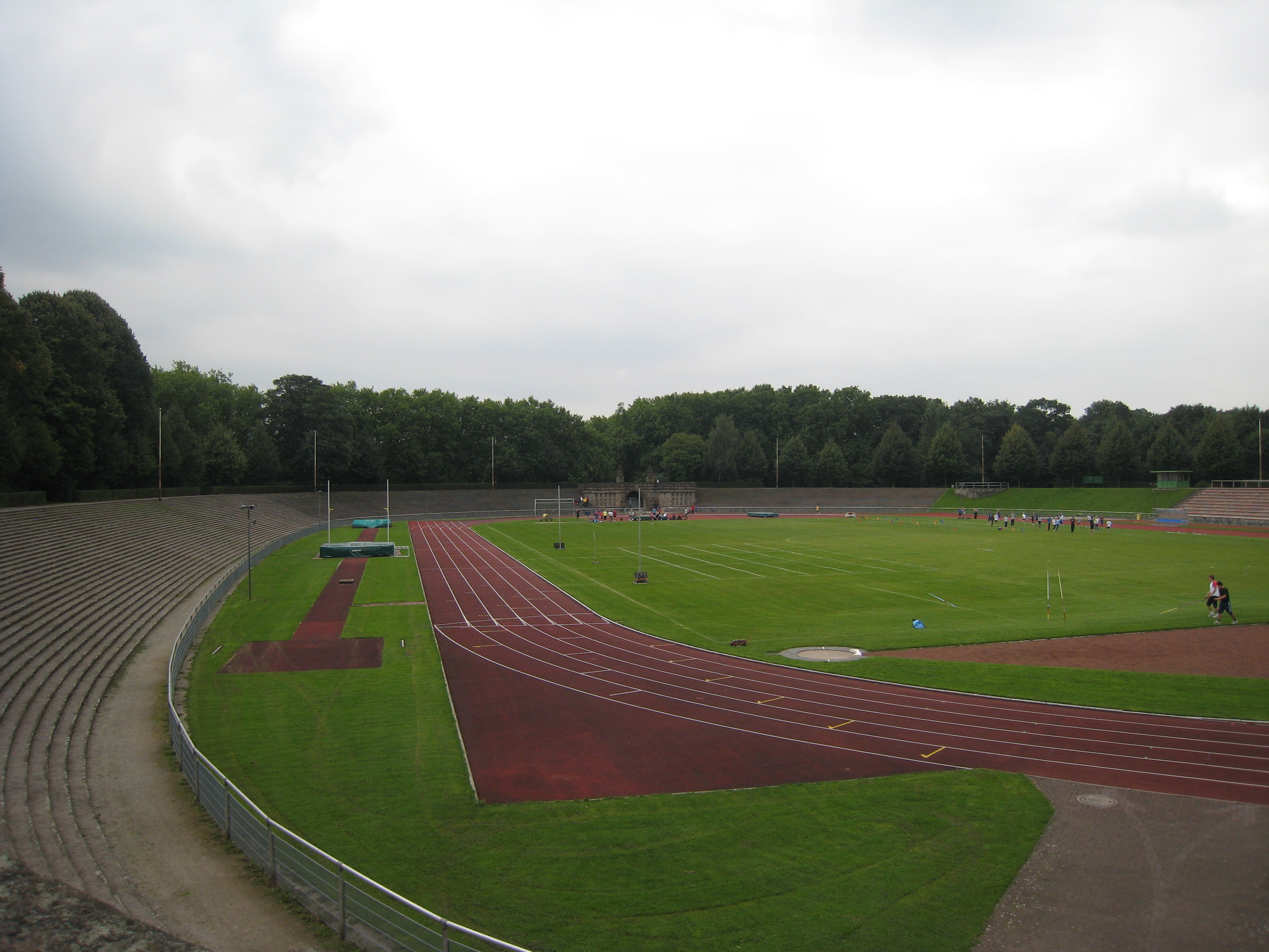 Stadion Gladbeck